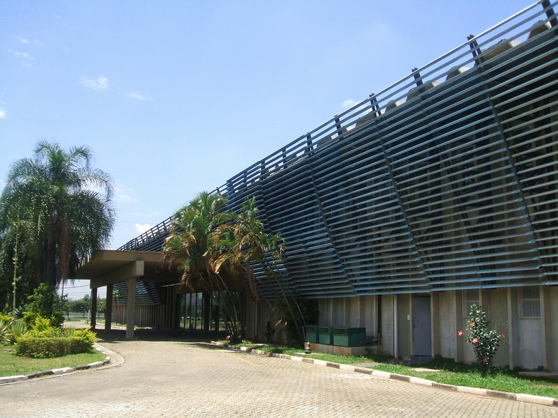 Fachada do Museu da Tecnologia de São Paulo (São Paulo, Brasil)